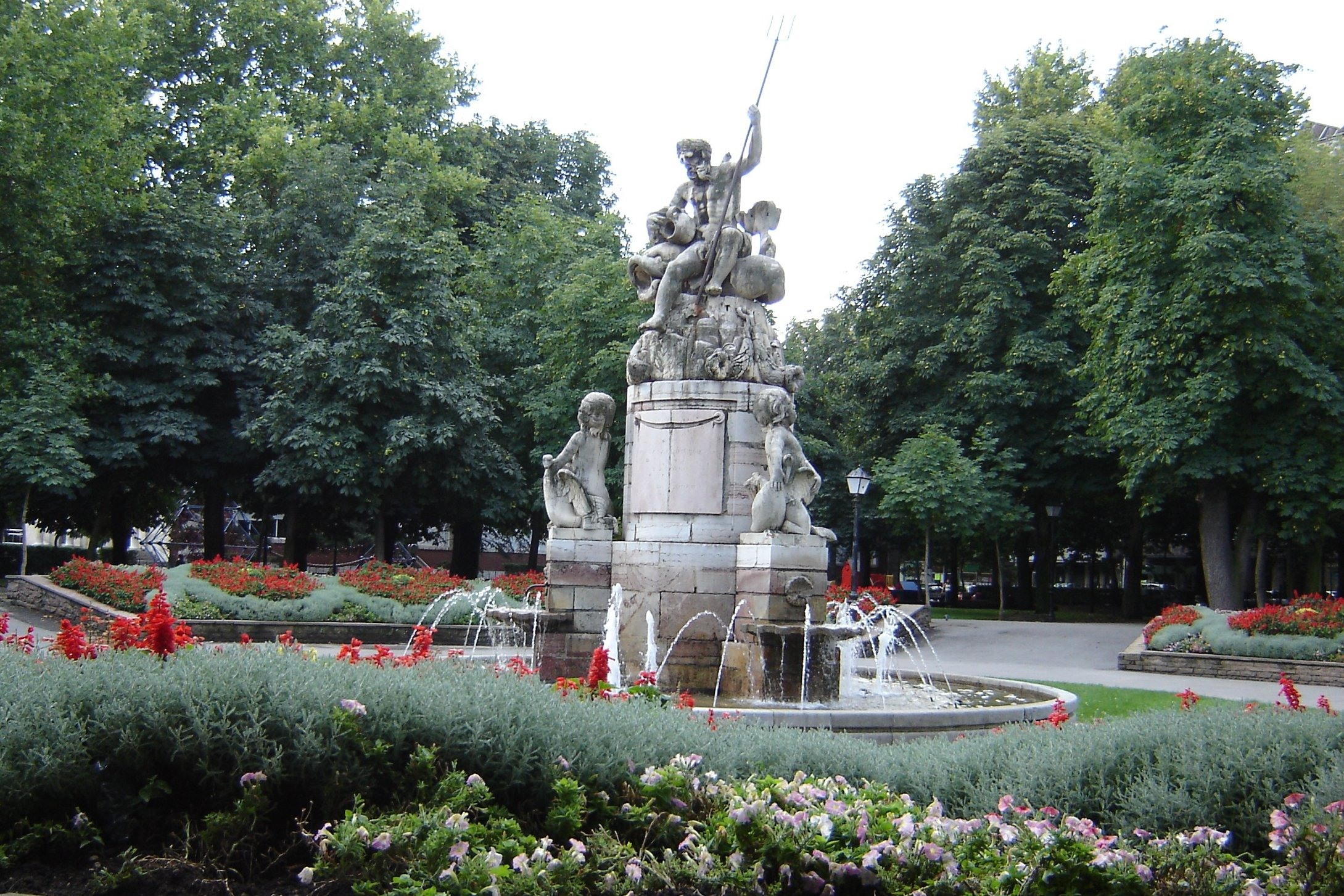 Parque de San Francisco